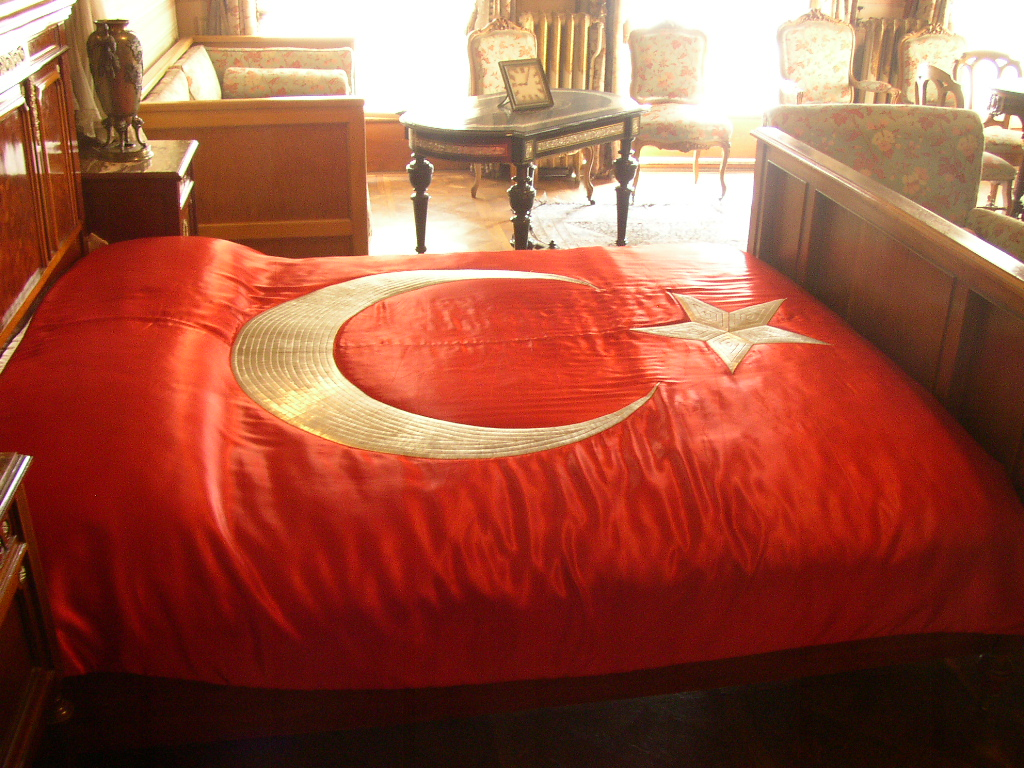 Il letto dove è spirato Ataturk, nel palazzo Dolmabahce, Istanbul. Immagine realizzata da pnc_net.